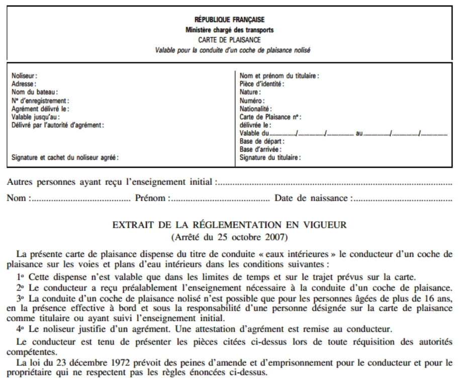 La carte de plaisance permet à des dates prédéterminées : la conduire d'une Pénichette ou d'un « coche de plaisance » de location donc la longueur est inférieur à 15 mètres et le taux de motorisation est inférieur à 1 (la vitesse ne peux jamais atteindre 20 km/h). L'entreprise de location dispense les formations suffisantes pour la conduite du coche de plaisance en location puis délivre la carte de plaisance. La carte de plaisance est délivré pour un seul voyage en eaux intérieures durant la location dans un parcours prédéterminé de « 3 eme type » (hors des routes des bateaux de commerce).